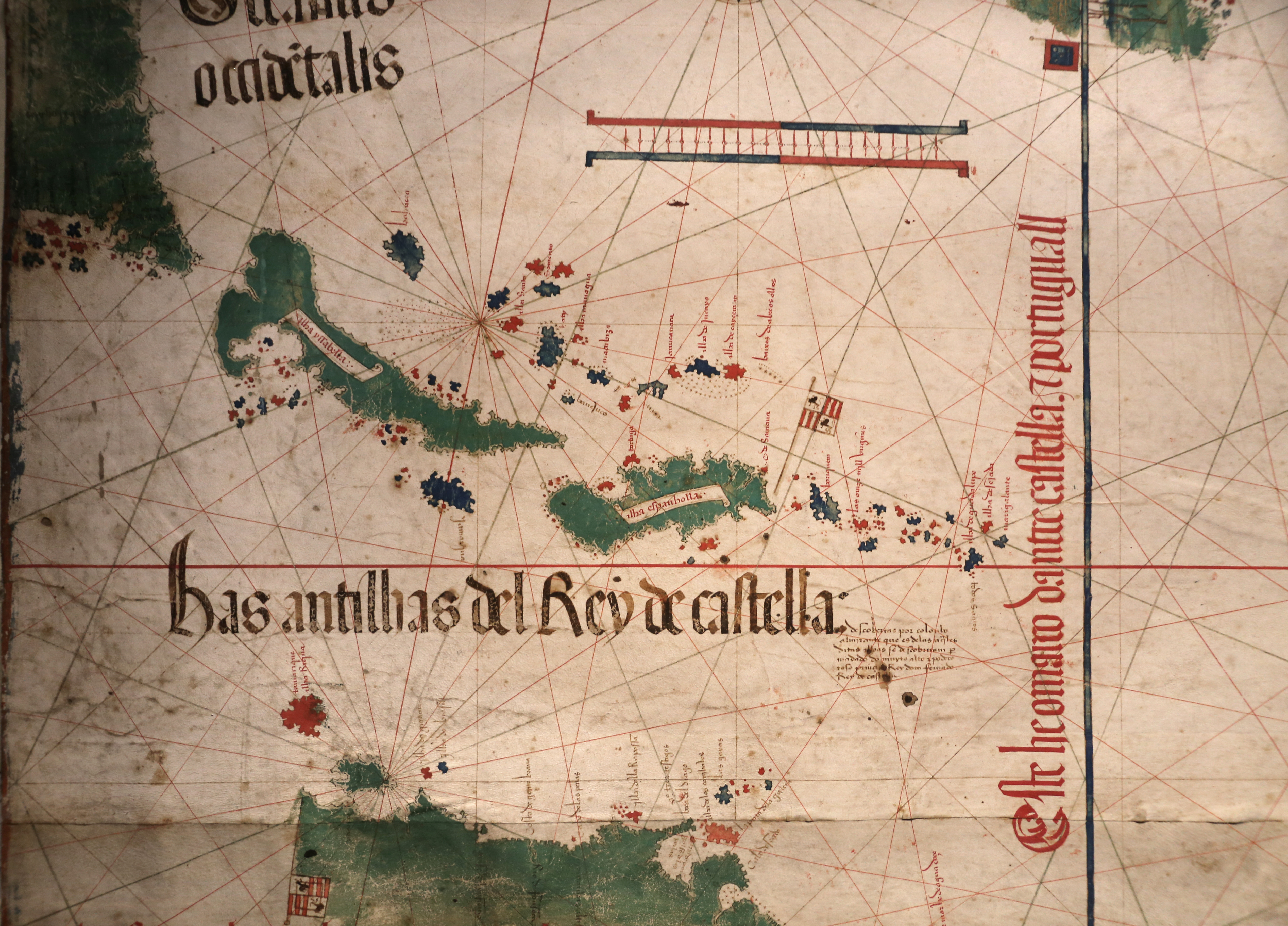 Palazzo dei Diamanti (Ferrara) This is a photo of a monument which is part of cultural heritage of Italy.